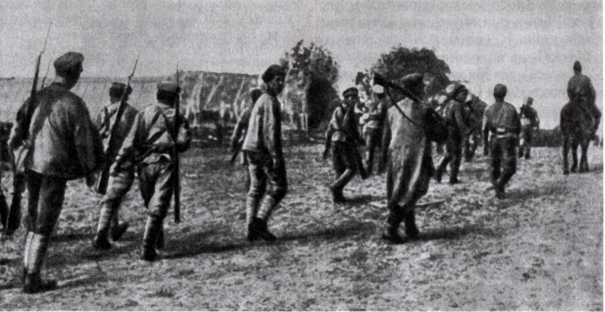 Спирин Л. М. Разгром армии Колчака. М., 1957: Отступление колчаковских войск (1919)